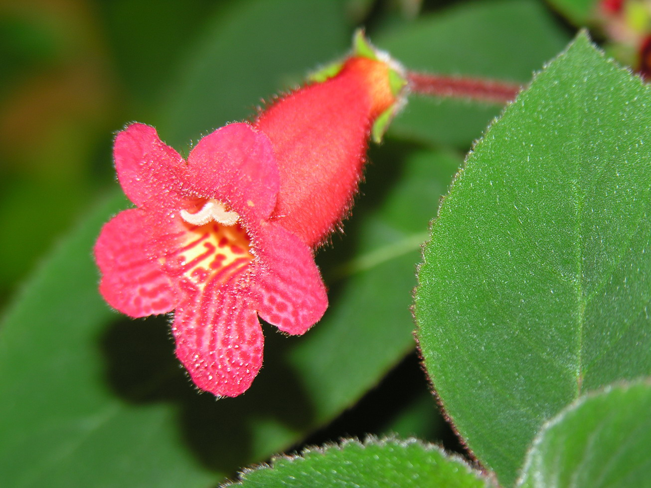 Kohleria sp. From lt.wikipedia: Image:Kohleria.JPG. Original description: Kolerija (Kohleria sp.) Šeima. Gesneriniai (Gesneriaceae) Foto: Algirdas, 2006 m. balandžio 26 d. Fotografuota kabinete.